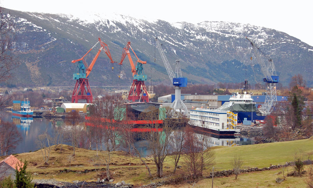 Die Kleven Verft auf der Insel Dimøya in Norwegen.